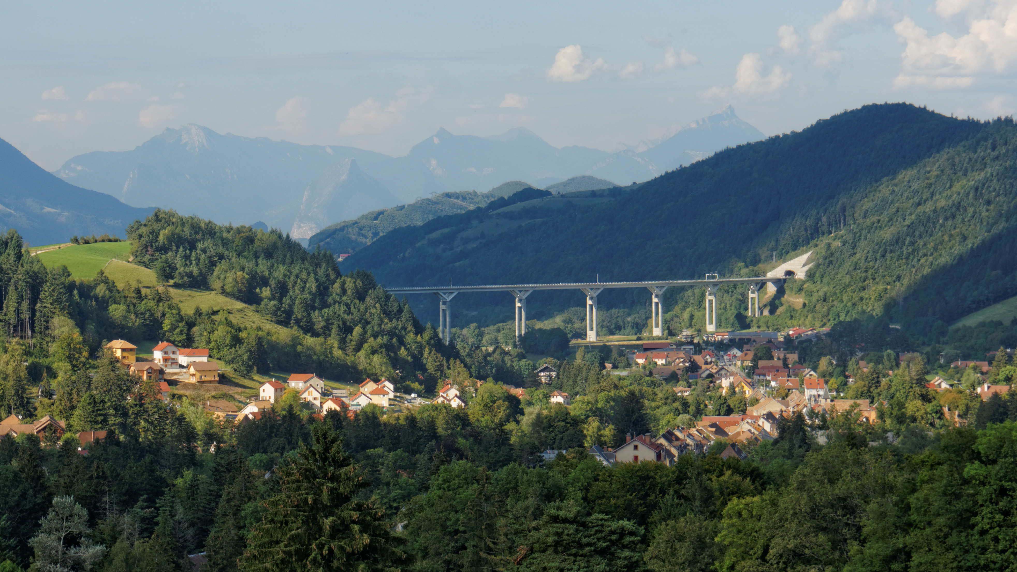 Le viaduc et le village de Monestier-de-Clermont